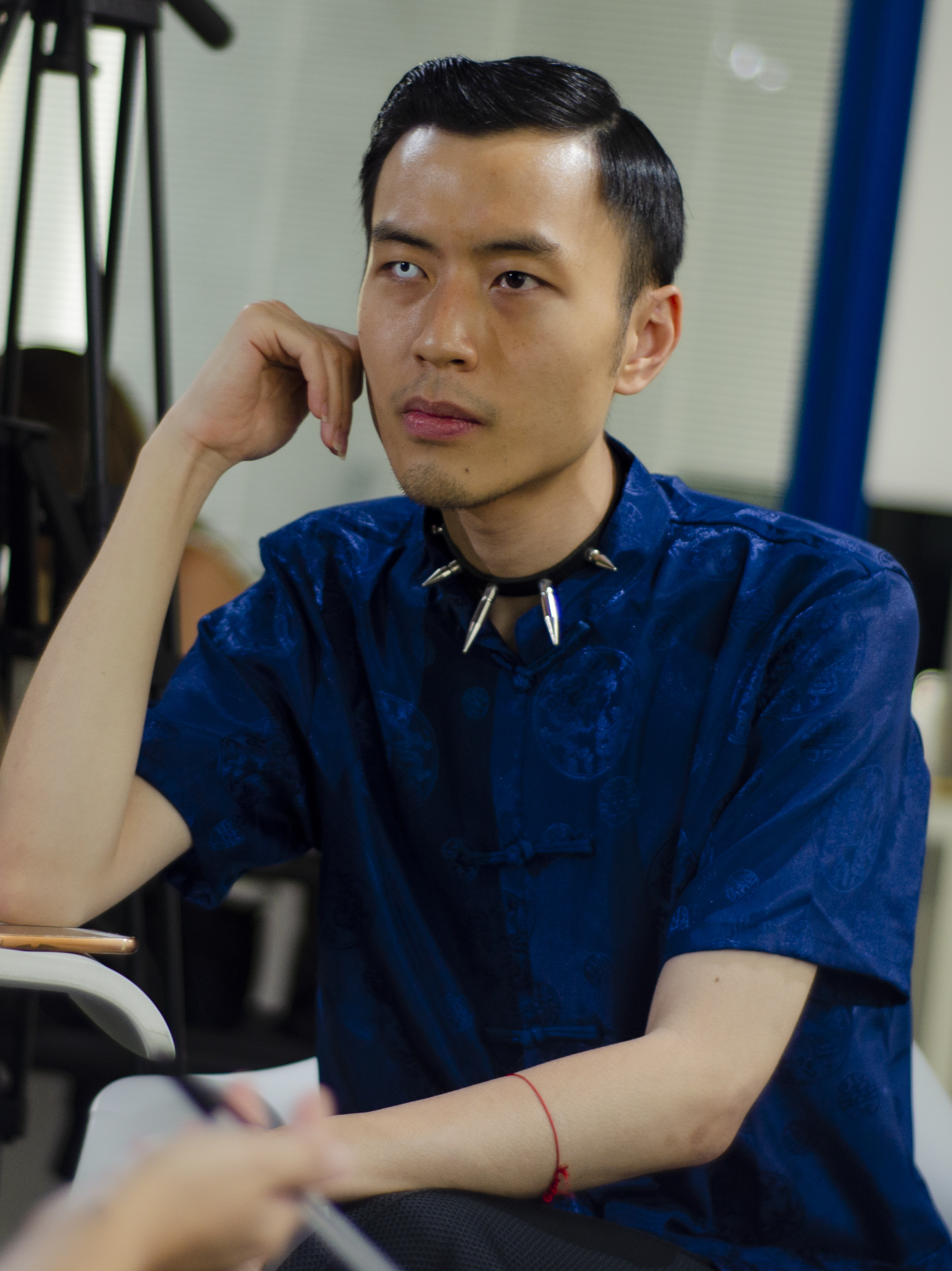 Chenta Tsai compone y canta pop, escribe columnas, es violinista de conservatorio y activista antirracista, pero todo lo hace bajo el seudónimo Putochinomaricón con el que se apropia de los insultos y pretende crear los referentes de los que careció.